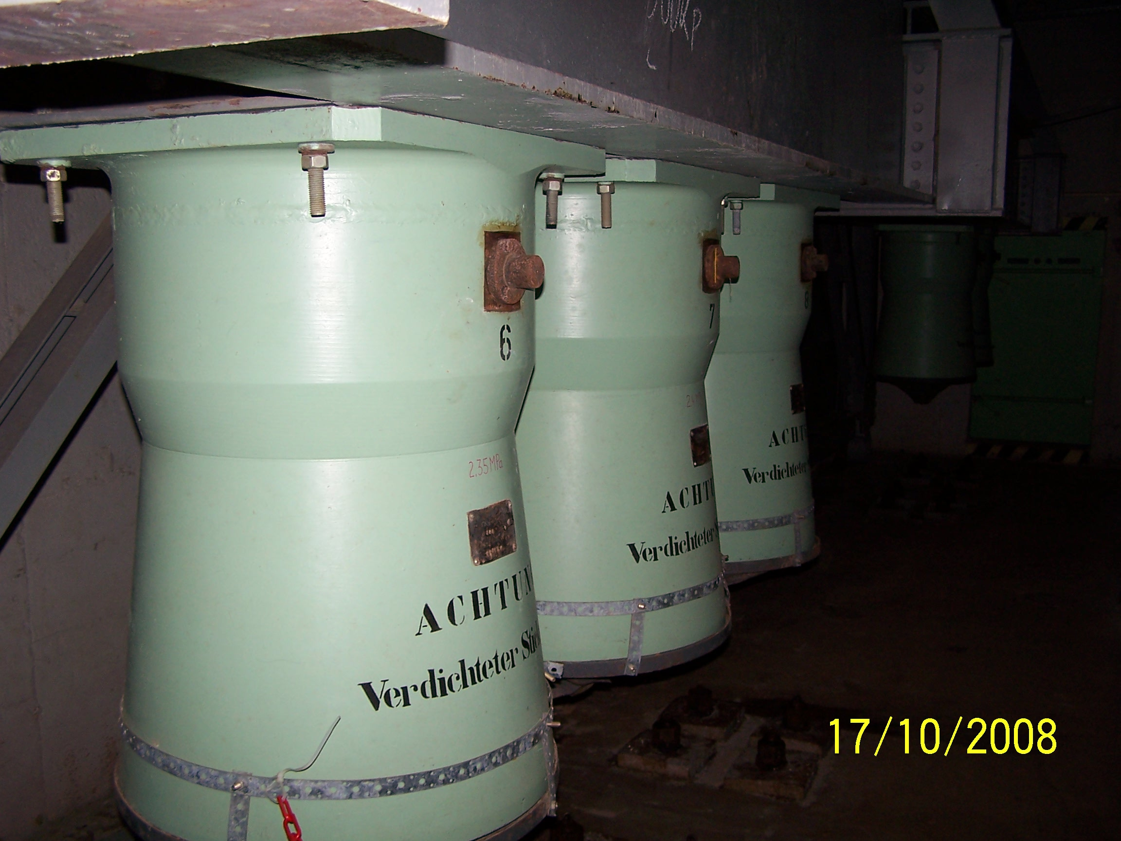 Stickstoffdäpfer